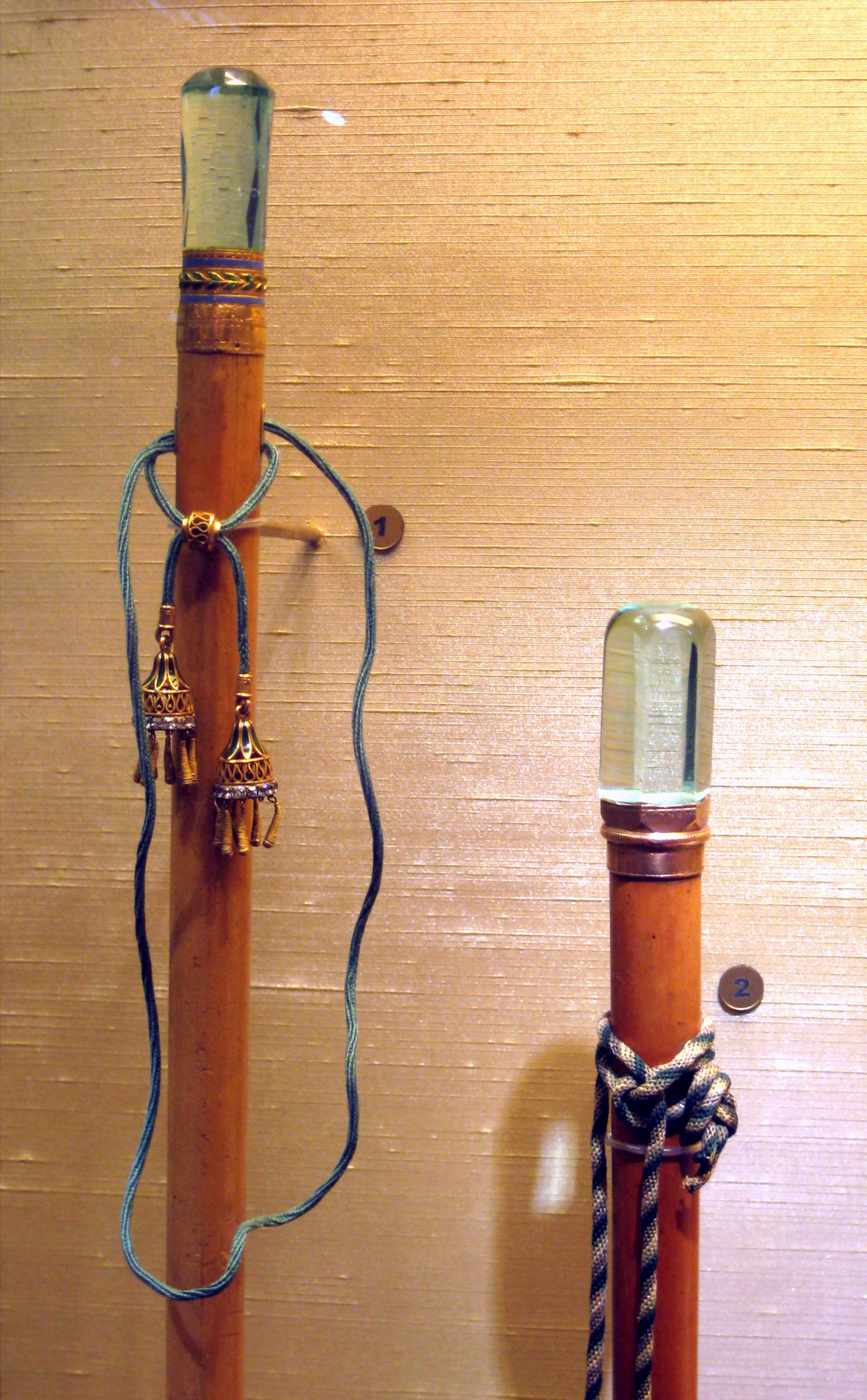 Трости. Принадлежали Екатерине II. Санкт-Петербург (?). 1770-80-е. Аквамарин, золото, серебро, гошенит, камыш. Эрмитаж.